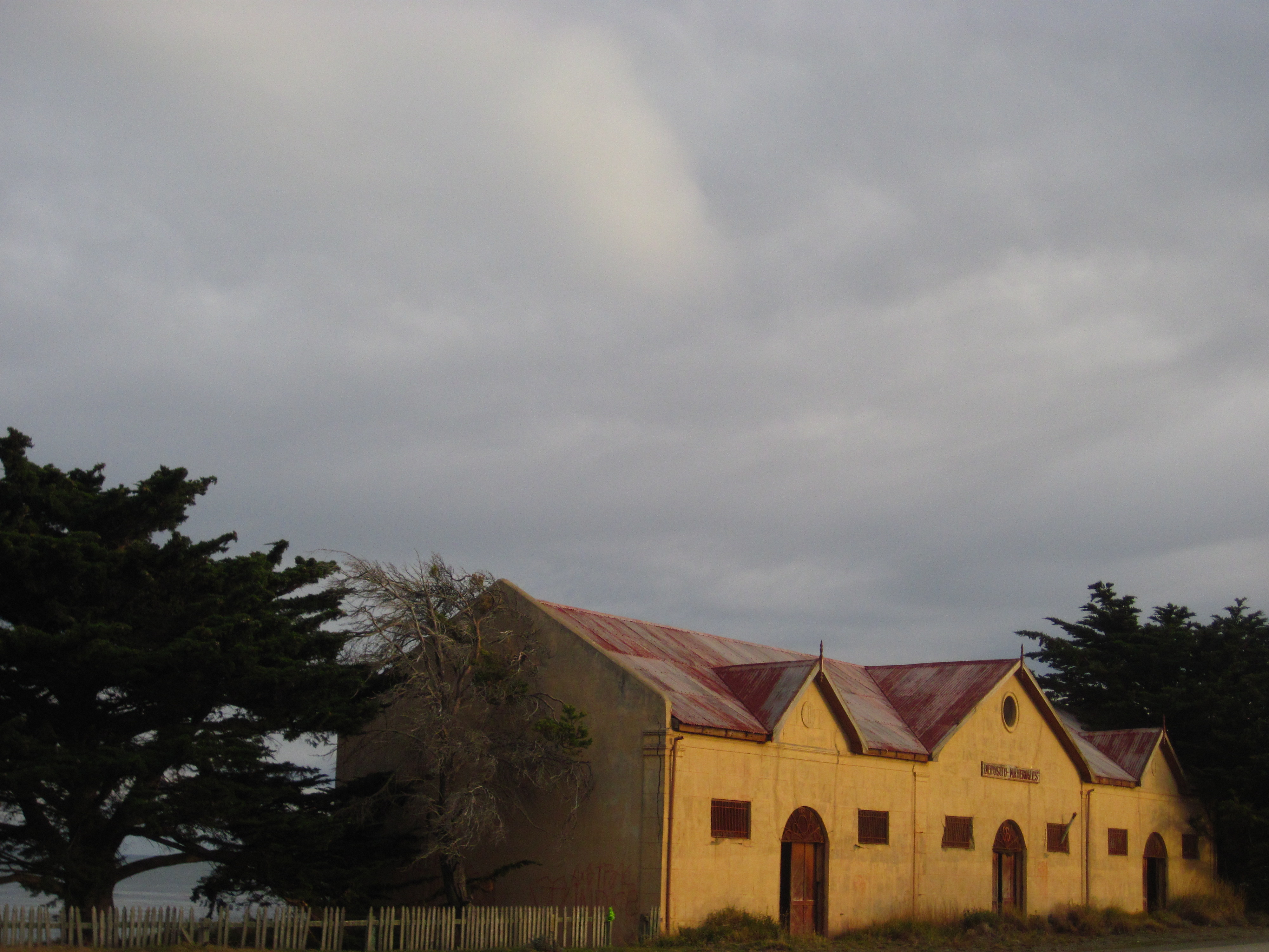 Fue fundada en 1876. En alguna época la estancia fue la mas grande de la Patagonia chilena con cerca de 100 mil hectáreas y pertenecía a José Menéndez, uno de los comerciantes mas poderosos de la Patagonia.